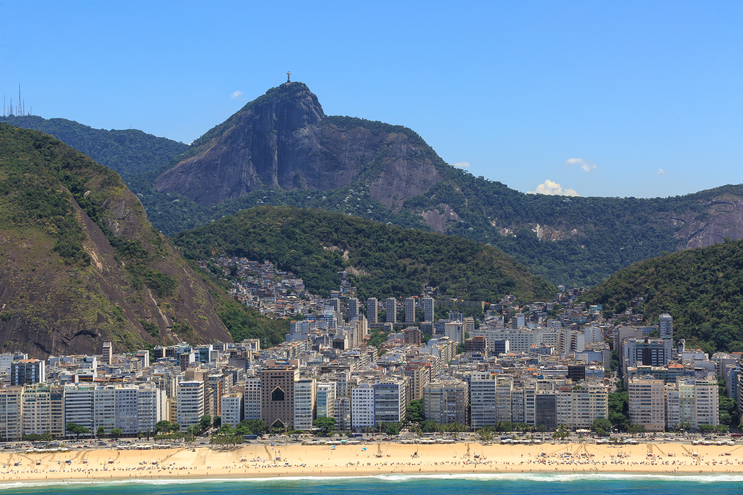 Vista aérea da praia e bairro de Copacabana, localizado na cidade do rio de Janeiro.